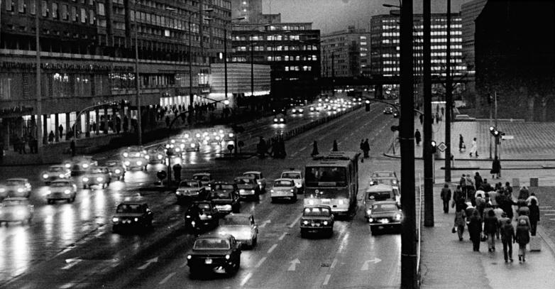 Berlin, Karl-Liebknecht-Straße, Nacht Zum Beitrag: "Entschuldigung für die Bummeltanten- Ein Brief, zwischen zwei Zügen in der Berliner Karl-Liebknecht-Straße geschrieben" ADN-ZB Sturm-8.12.1975 Die Berliner Karl-Liebknecht-Straße am Abend. Blick in Richtung Alexanderplatz. (Bitte beachten Sie hierzu auch P 1208-0320N)